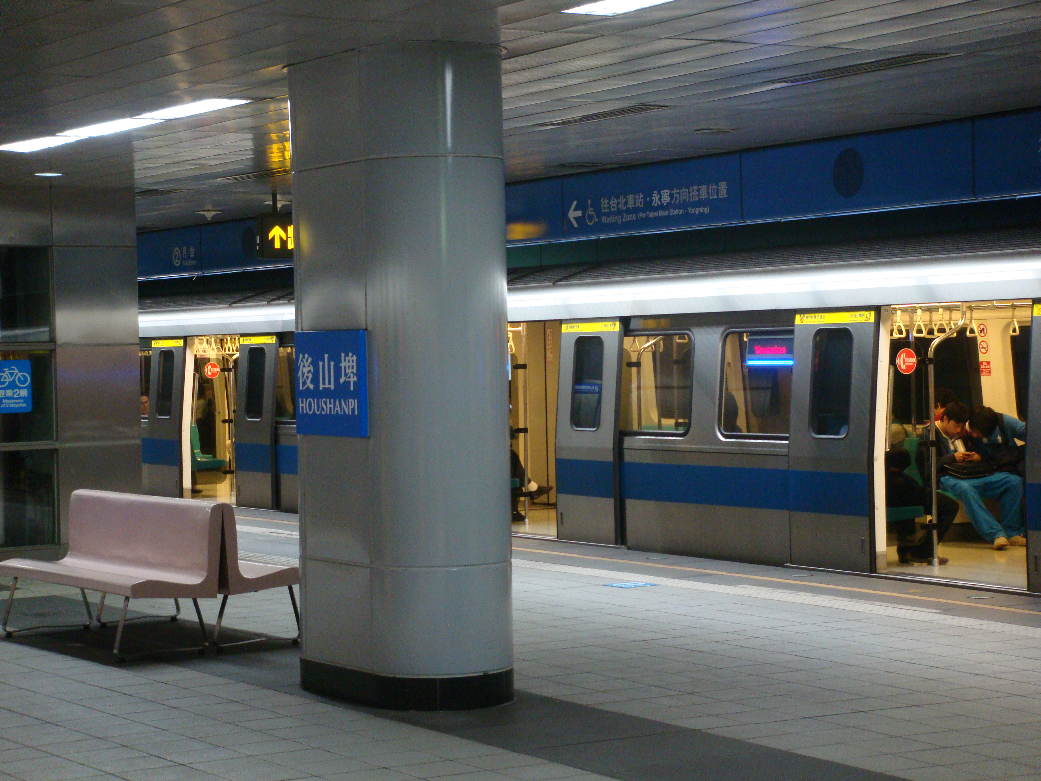 Houshanpi Station, Nangang Line, Taipei Metro, Taiwan.